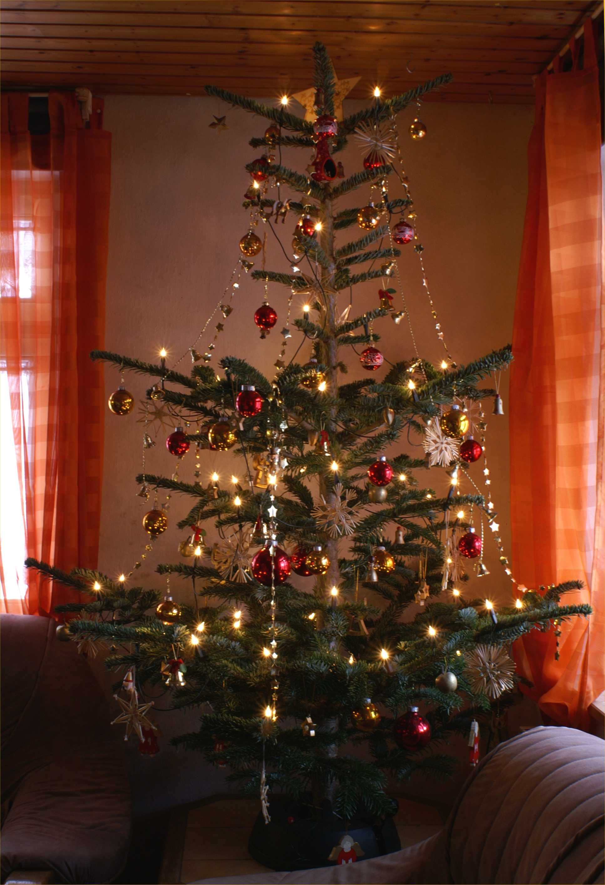 Nordmanntanne als Christbaum 2008